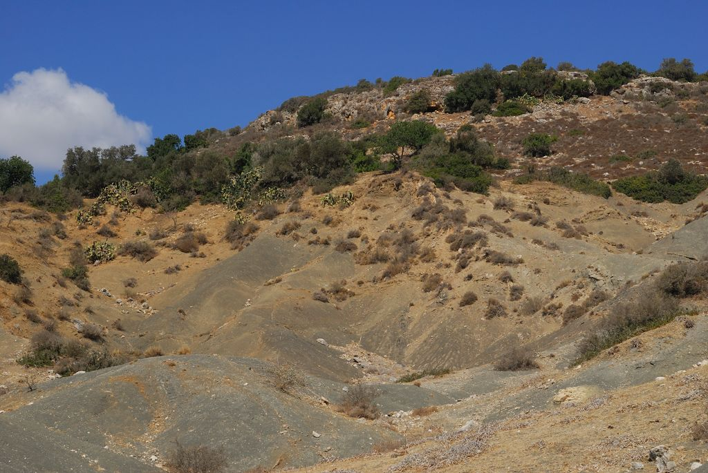 הר הגעש כרם מהר"ל